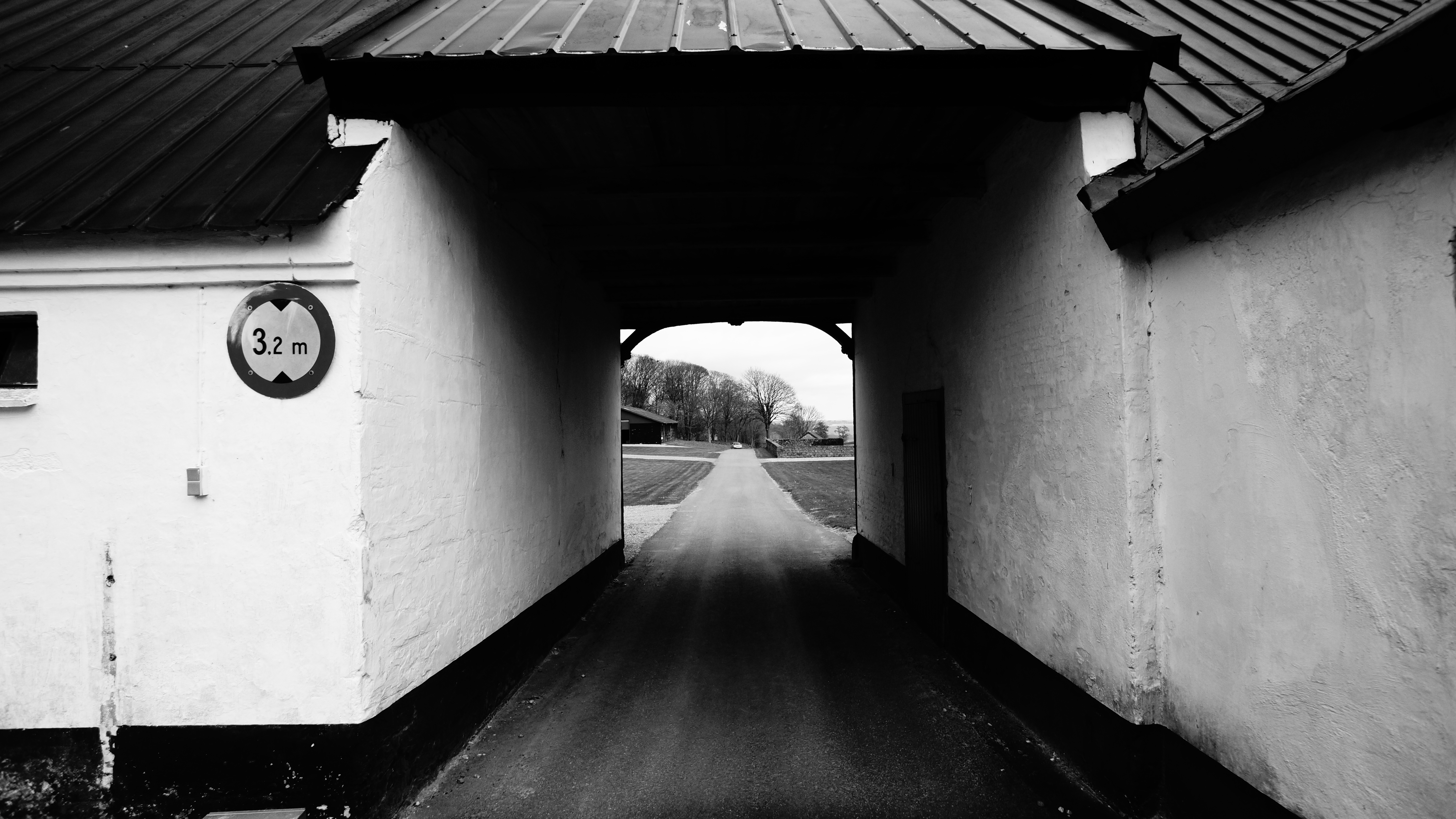 Kommunevej gennem stald, Isgård